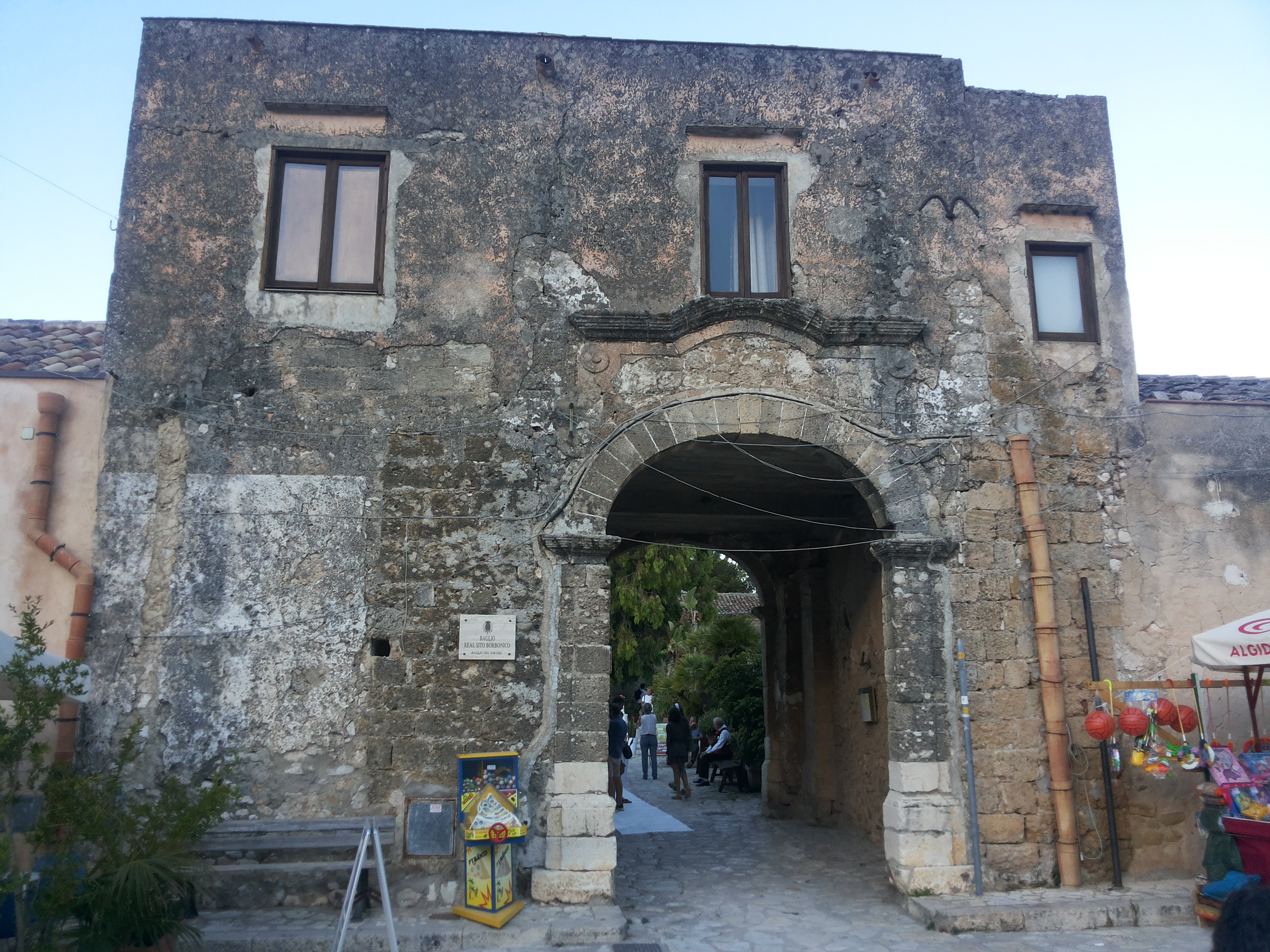 Entrata del Baglio di Scopello presso Castellammare del Golfo (TP).